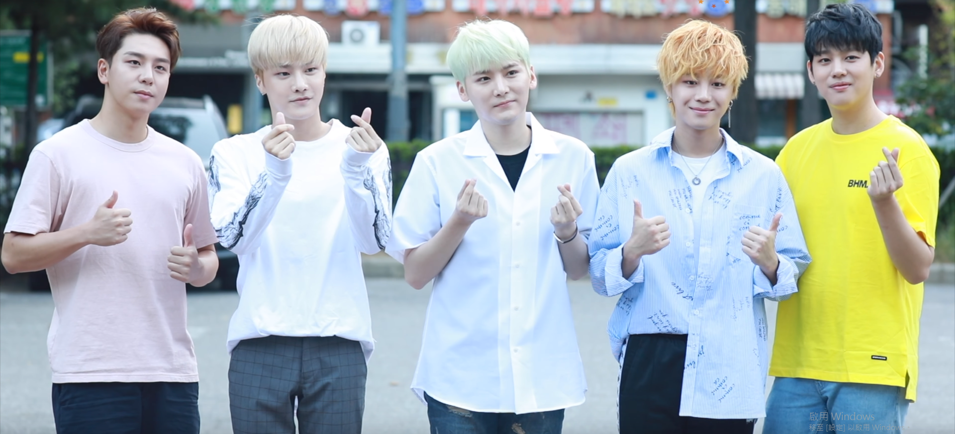 8월 17일 오전 KBS 뮤직뱅크에 빅플로가 리허설 녹화에 참여하기 위해 출근하고 있다. #빅플로 #Bigflo